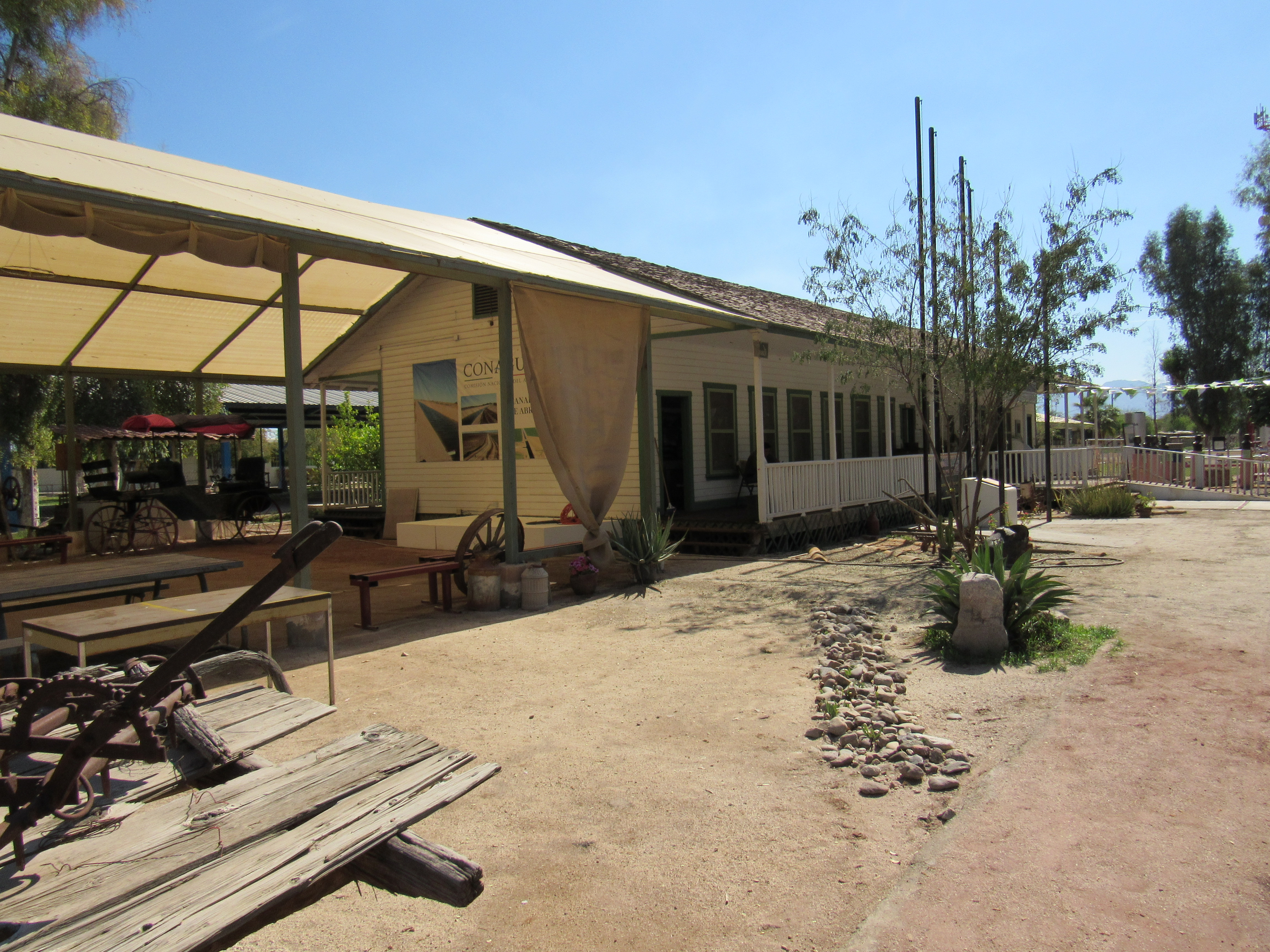 Aspecto del espacio exterior que circunda al l Museo del Asalto a las Tierras, pueden apreciarse, en acercamiento, algunos implementos usados en la época del latifundio extranjero.